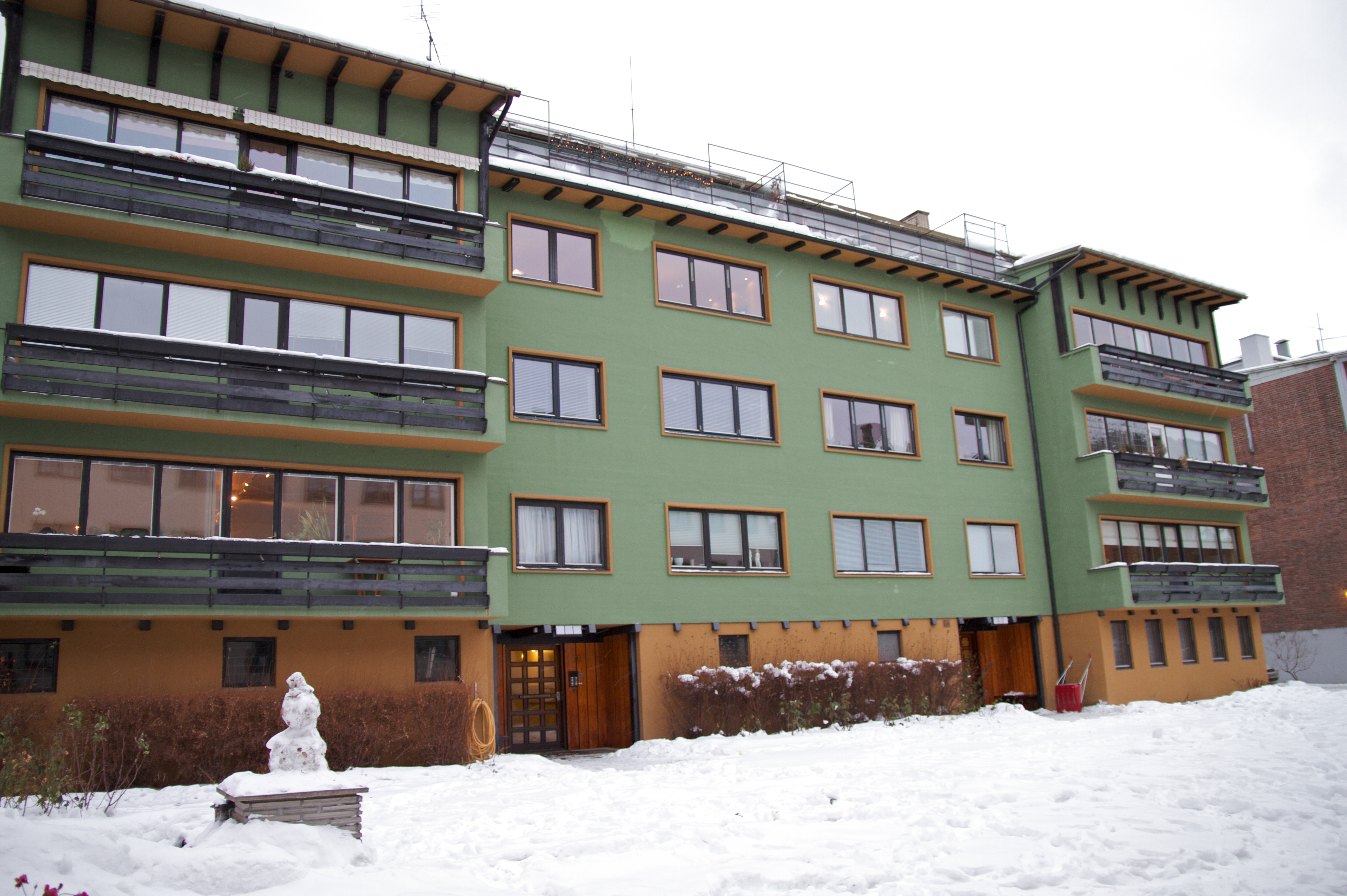 Drammensveien 50 C-D i Oslo.